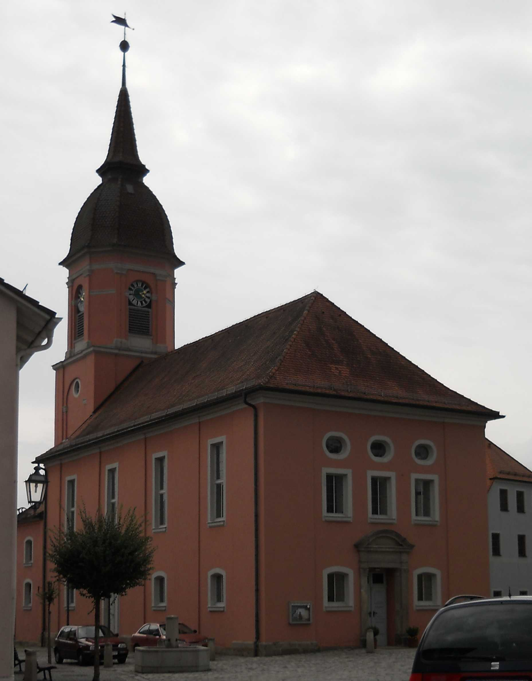 Evangelisch-lutherische Markgrafenkirche Treuchtlingen (Landkreis Weißenburg-Gunzenhausen)